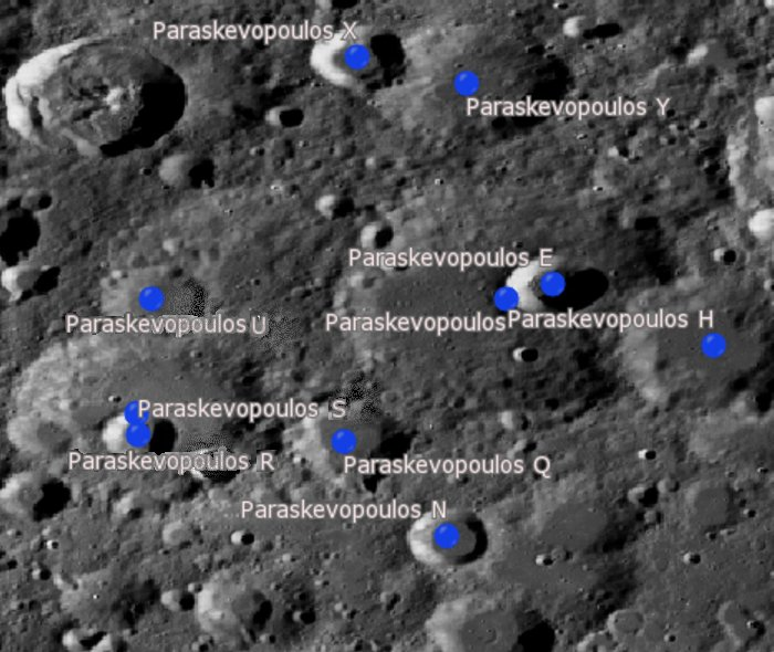 Cráter lunar Paraskevopoulos. Cráteres satélite. (Imagen LRO)